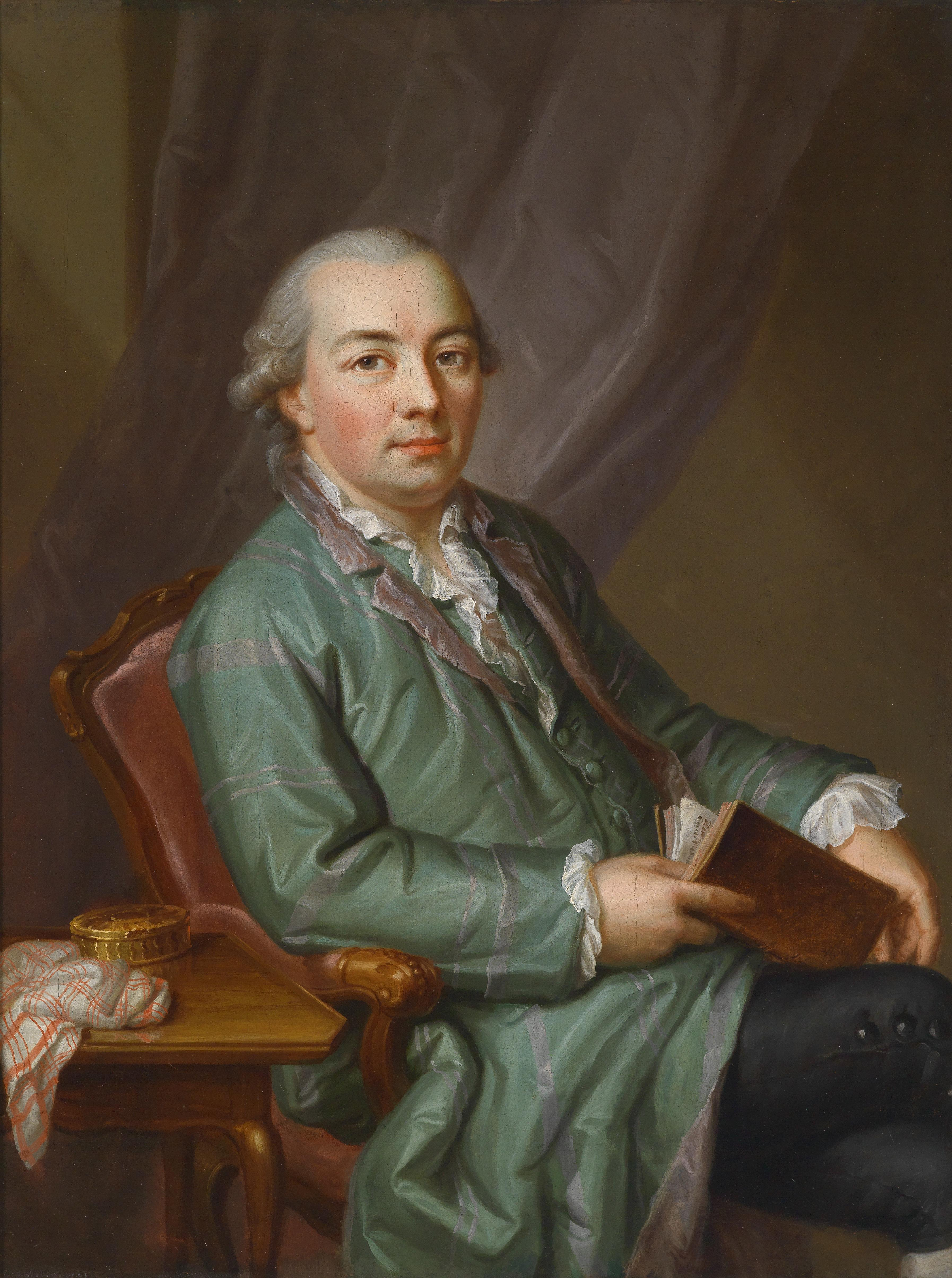 Portrait des Salzkassenverwalters der Stadt Bern Johannes Jenner, Gesandter nach Bayern und Paris zu Salzverhandlungen 1782